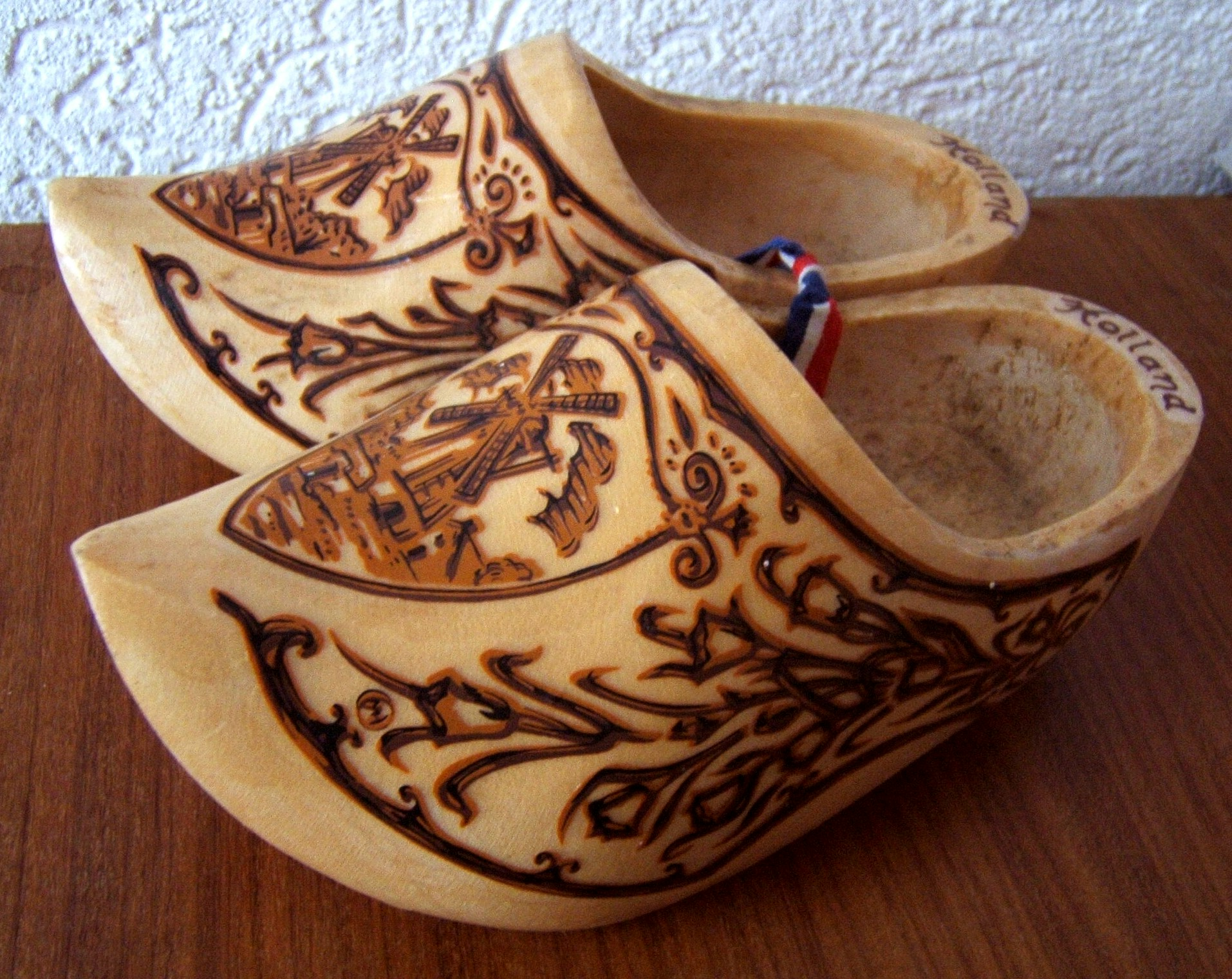 Souvenir: klompjes